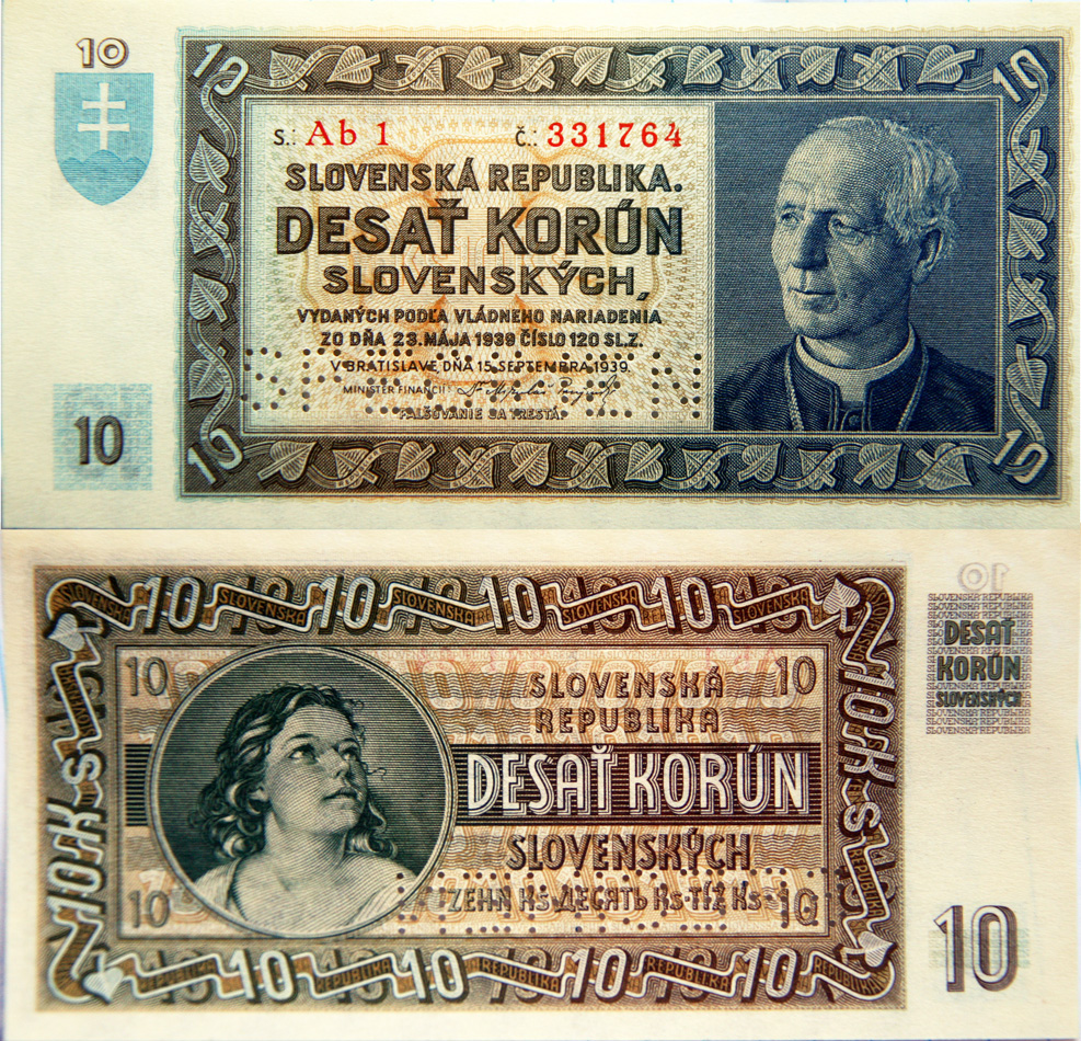 10 korún slovenských z roku 1939 )obdobie vojnovej Slovenskej republiky. Desaťkorunáčka. Averz: vpravo poprsie Andreja Hlinku; vľavo text SLOVENSKÁ REPUBLIKA. / DESAŤ KORÚN / SLOVENSKÝCH. / VYDANÝCH PODĽA VLÁDNEHO NARIADENIA / ZO DŇA 23. MÁJA 1939 ČÍSLO 120 SL. Z. / V BRATISLAVE DŇA 15. SEPTEMBRA 1939 /... Vľavo na bielom okraji slovenský štátny znak. Reverz: pravo nápis SLOVENSKÁ REPUBLIKA / DESAŤ KORÚN / SLOVENSKÝCH / ... Vľavo dievčenské poprsie sprava.